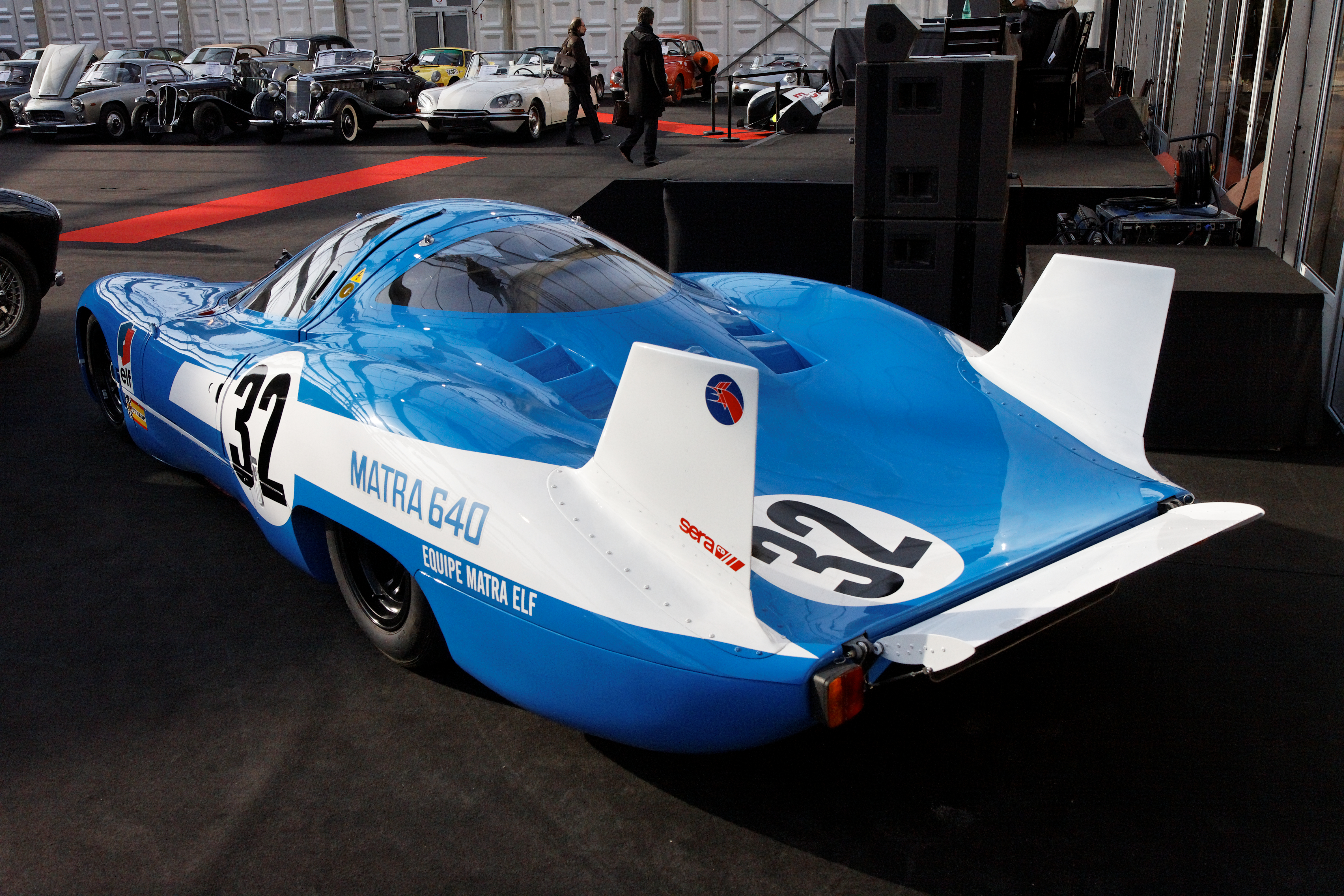 Matra MS640 - Festival Automobile International 2011 - Vente aux enchères